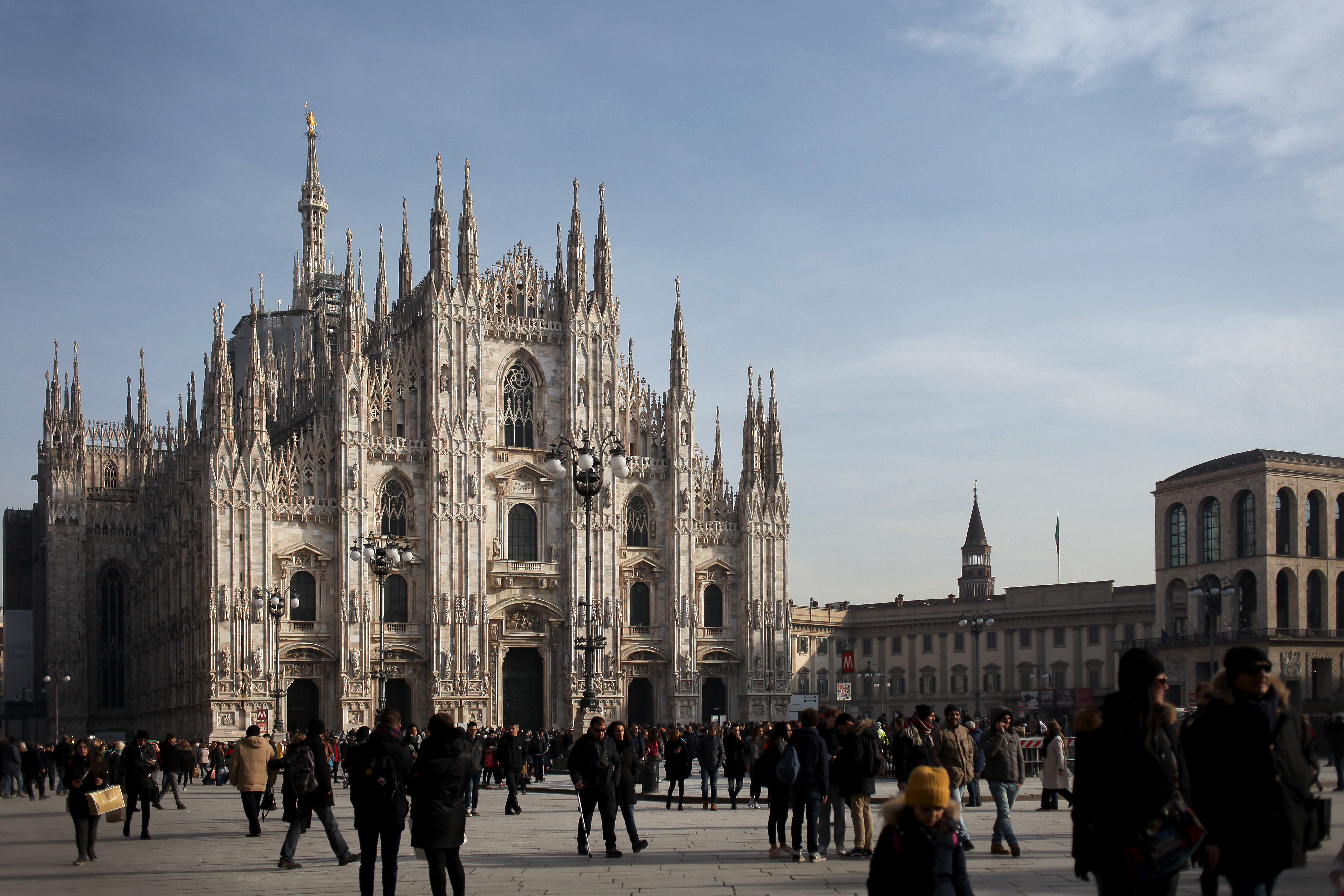 Piazza del Duomo, Milano, veduta generale con a destra il Museo del Novecento